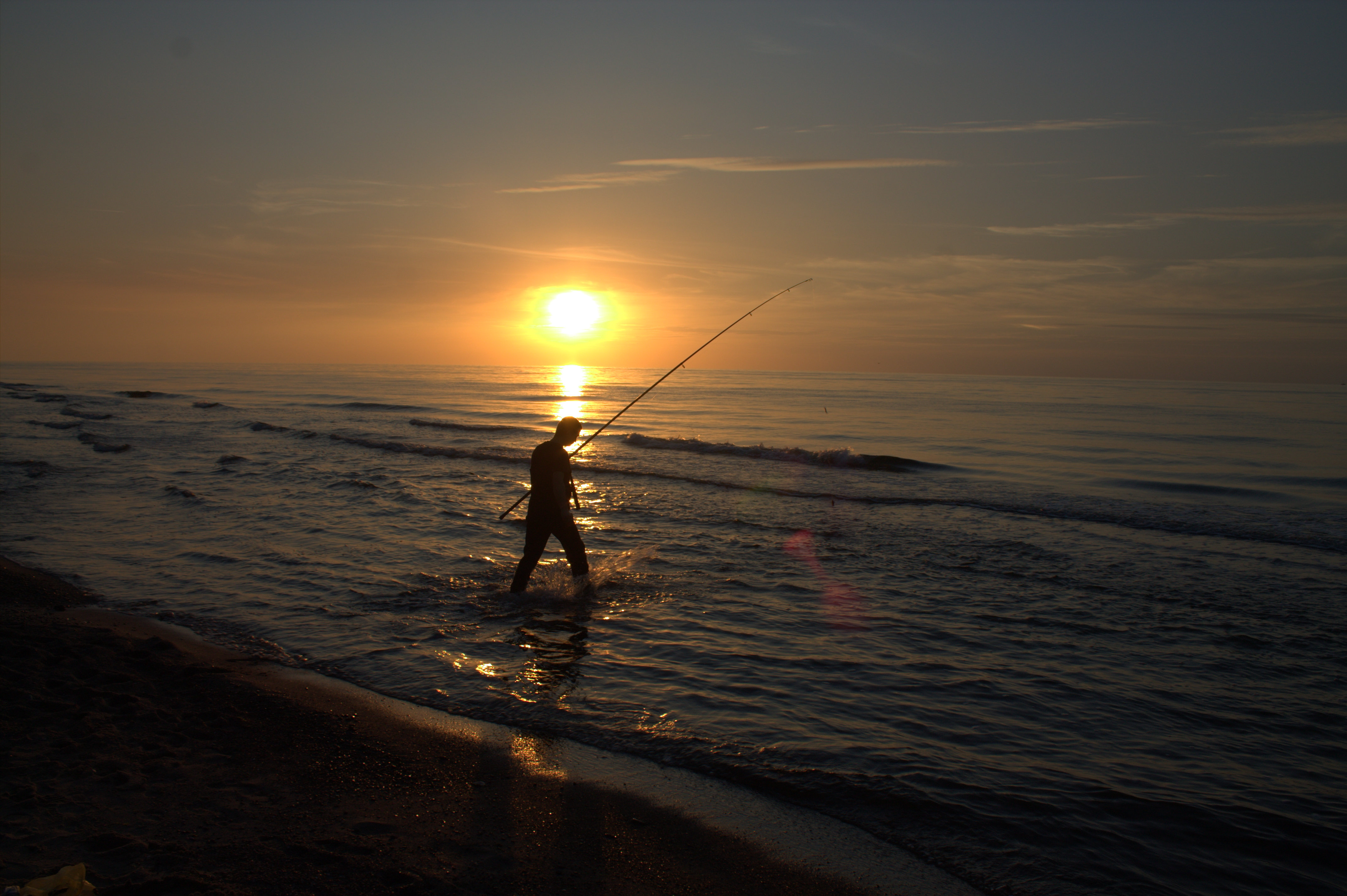 Surfcasting z plazy morskiej